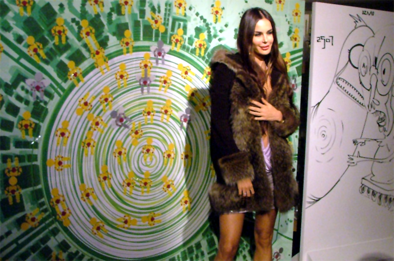 Nina Morić, Evento di lancio della Xbox 360Lancio Xbox 360